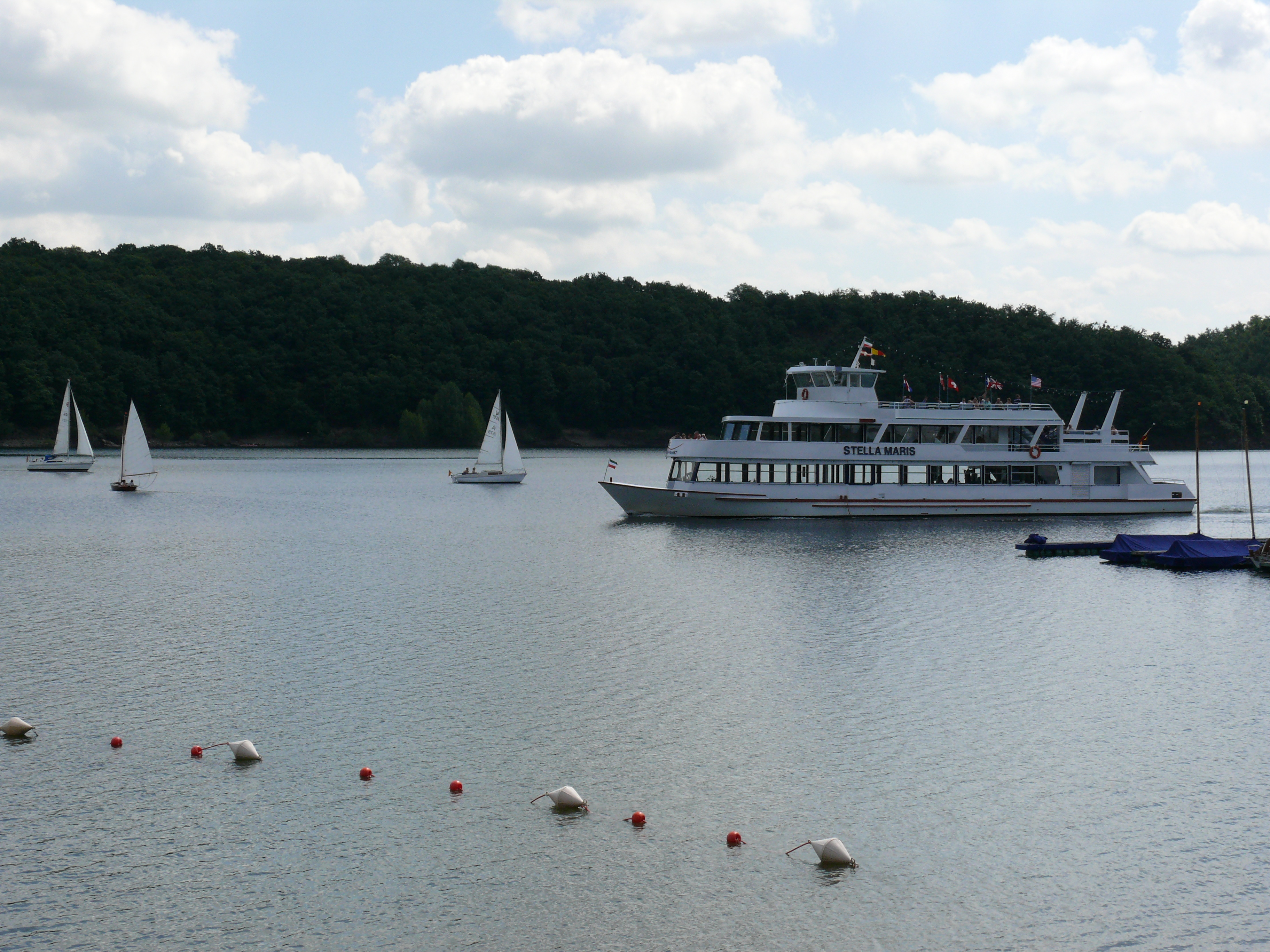 Ausflugsschiff, Rursee-Schiff, Rursee Name of ship: Stella Maris